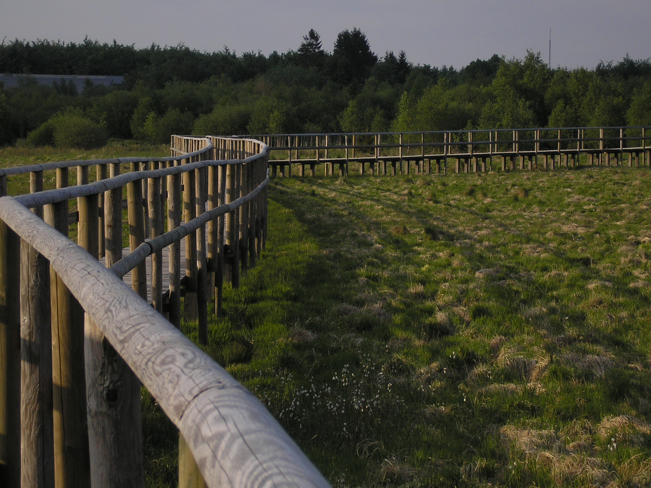 Polleurvenn, East Belgium